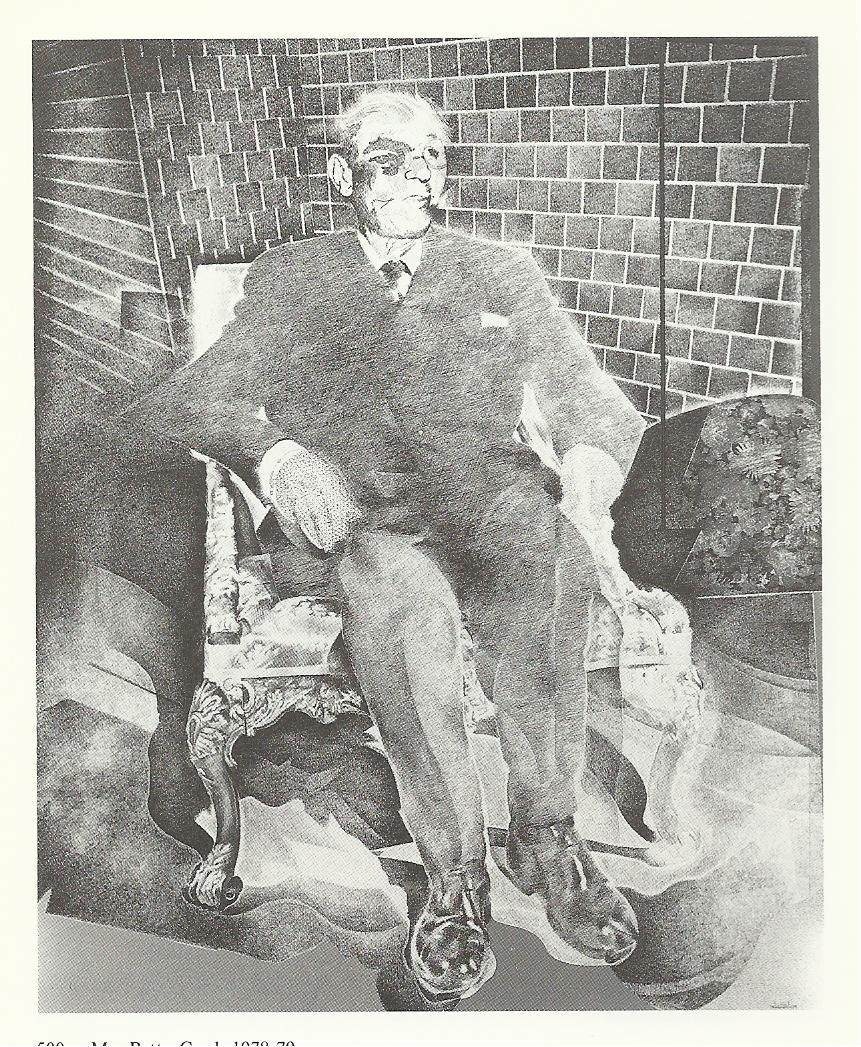 Mr Pettygaul, 1978-79. T. china/Papel/Madera. 162 X 130 cm.